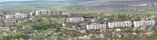 Панорама Чимишлии